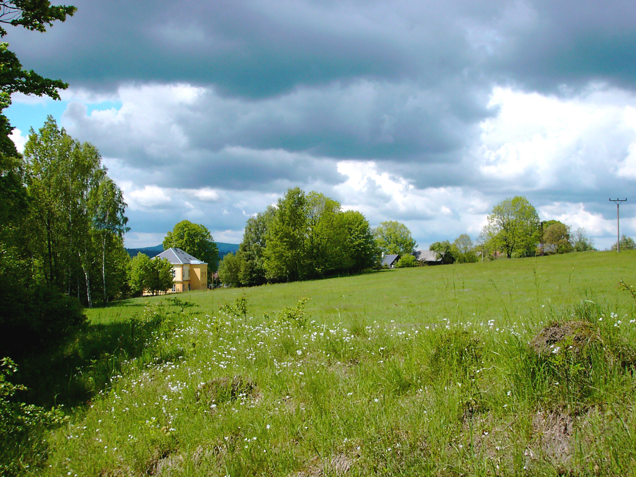 Hrensko, Ortsteil Mezná von Osten